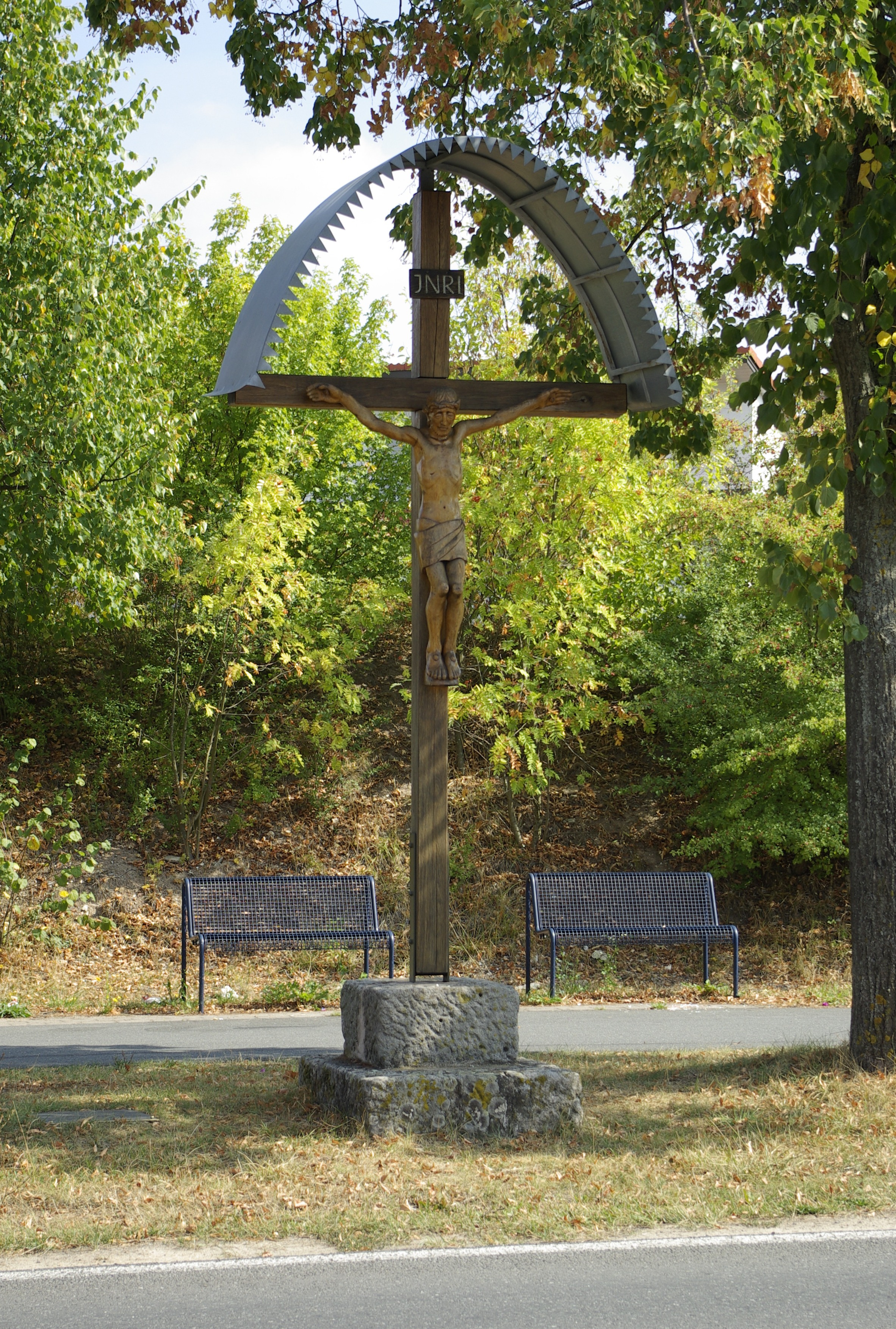 Wegkreuz (1953) von Lothar Strauch an der Weißen Marter im Erlanger Stadtteil Büchenbach.